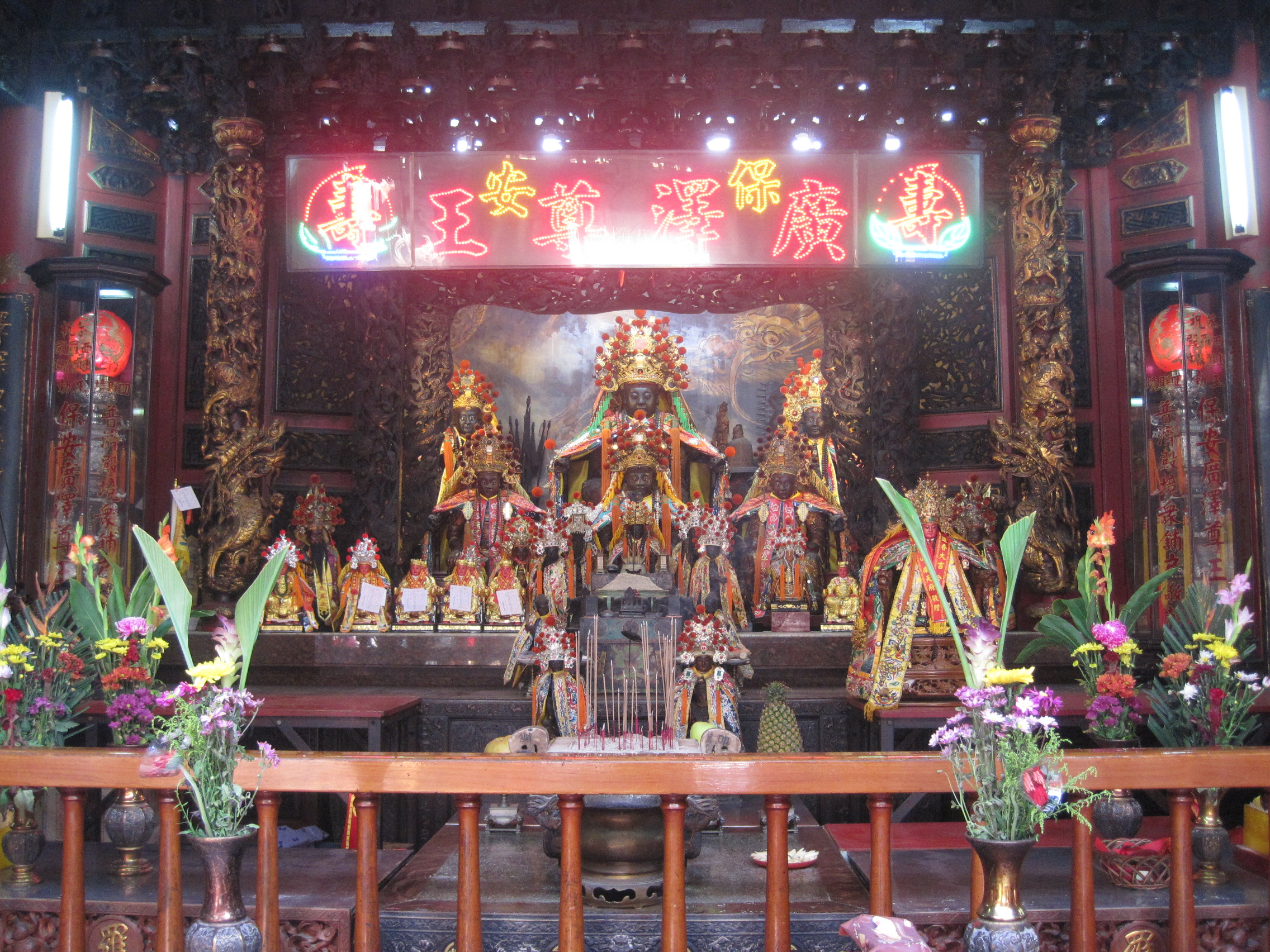 南勢港西羅殿供奉的神像